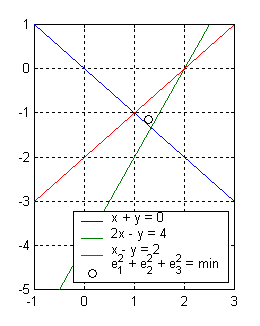 Řešení přeurčené soustavy rovnic metodou nejmenších čtverců.